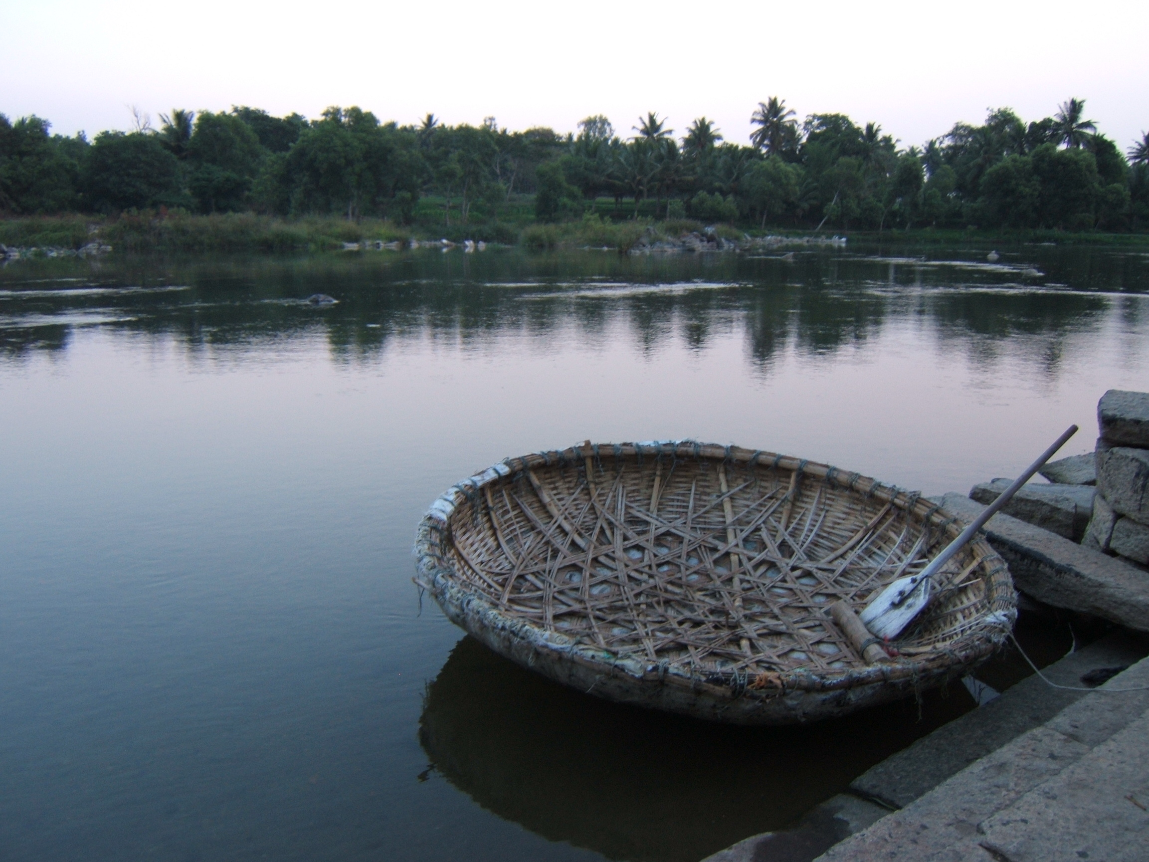 Srirangapatnam, Karnataka, India Boat at Kaveri river at Shrirangapatnam